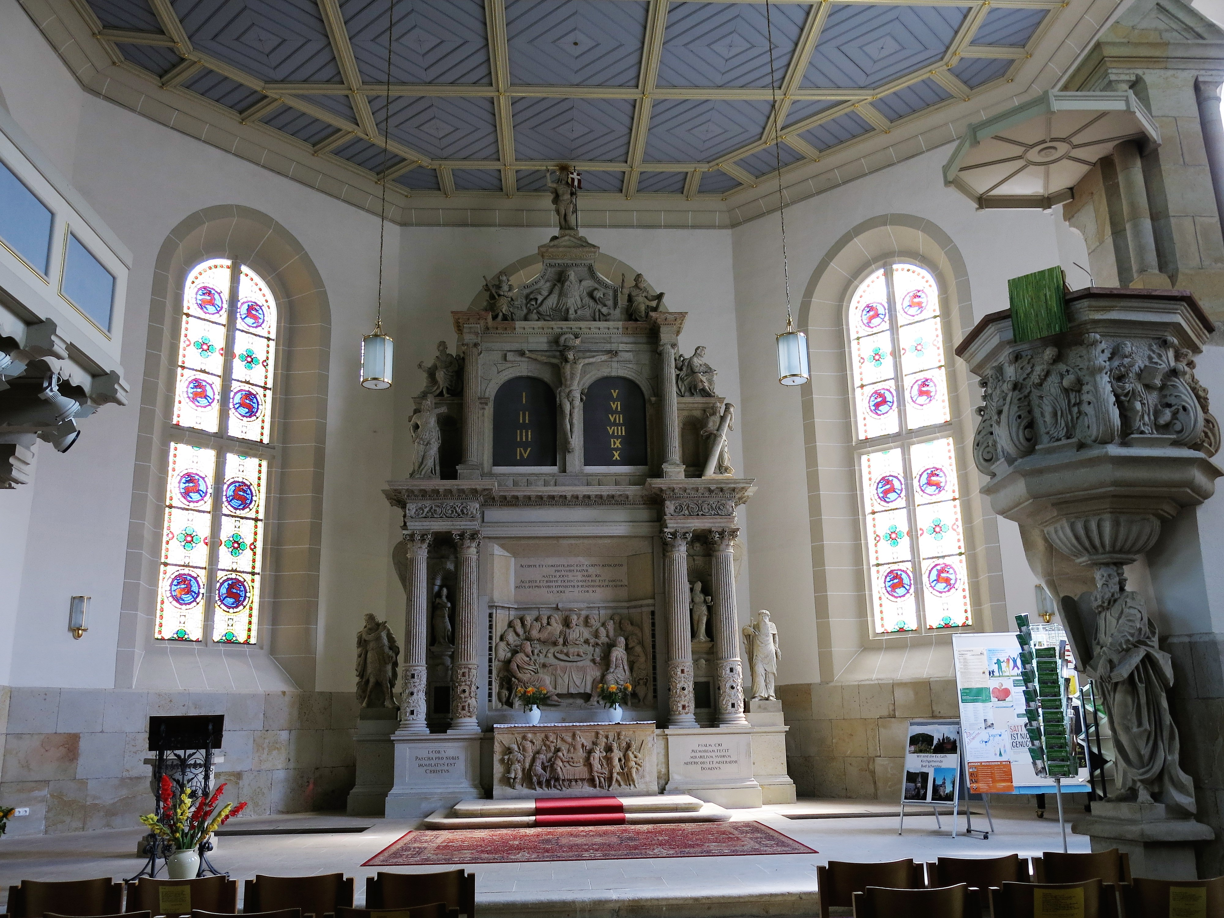 St. Johanniskirche in Bad Schandau, Chorraum